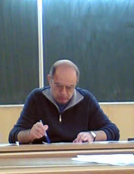 Romanian philosopher Valentin Mureșan leading his class